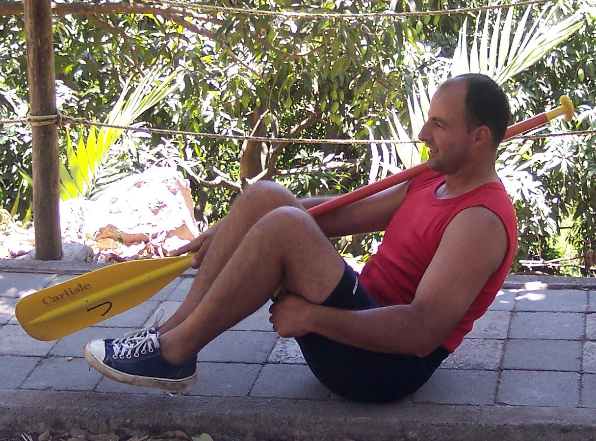 Position recommended for a person that fell in white water during a rafting SPANISH: Posición recomendada a una persona que cae a aguas blancas durante un descenso de río. Photo taken in El Descabezadero, Actopan Municipality, State of Veracruz, Mexico. SPANISH: Foto tomada en El Descabezadero, Municipio de Actopan, Estado de Veracruz, Mexico.